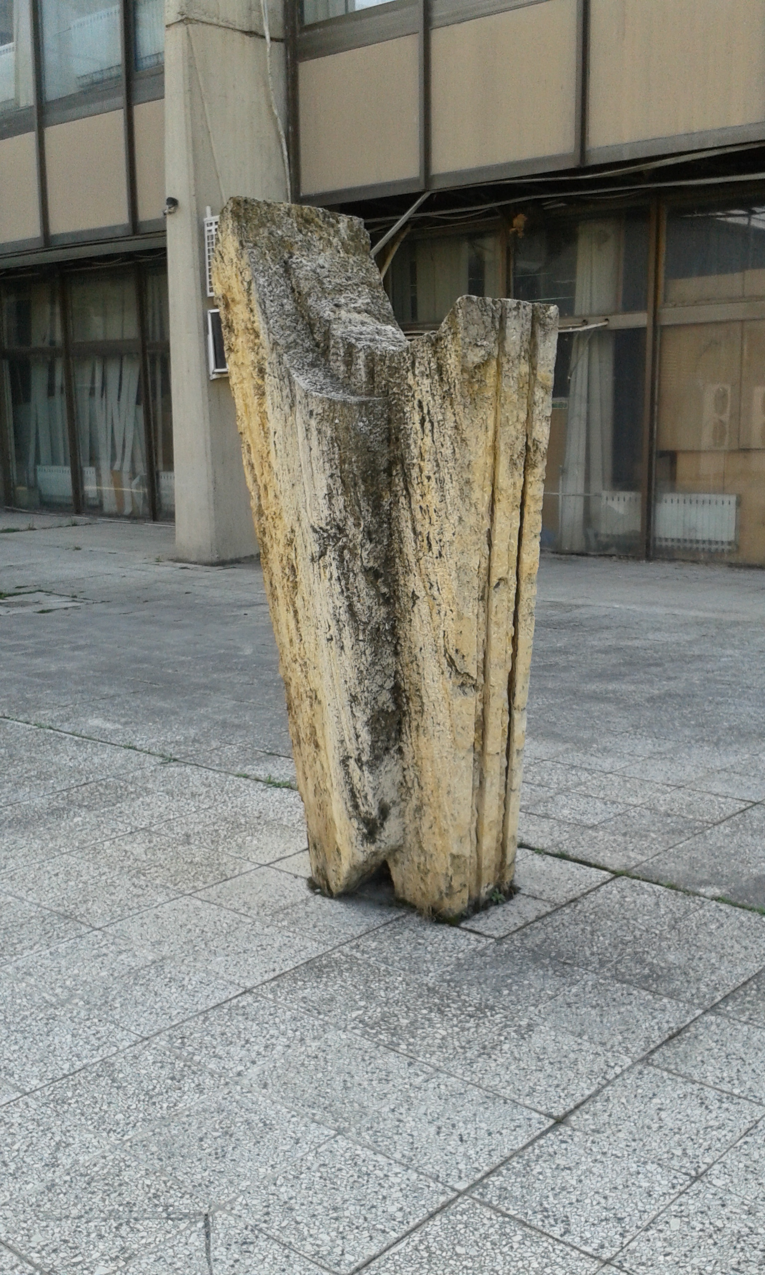 Споменик на локацијата на родната куќа на Раде Јовчевски - Корчагин, во склоп на комплексот на Народната банка на Македонија